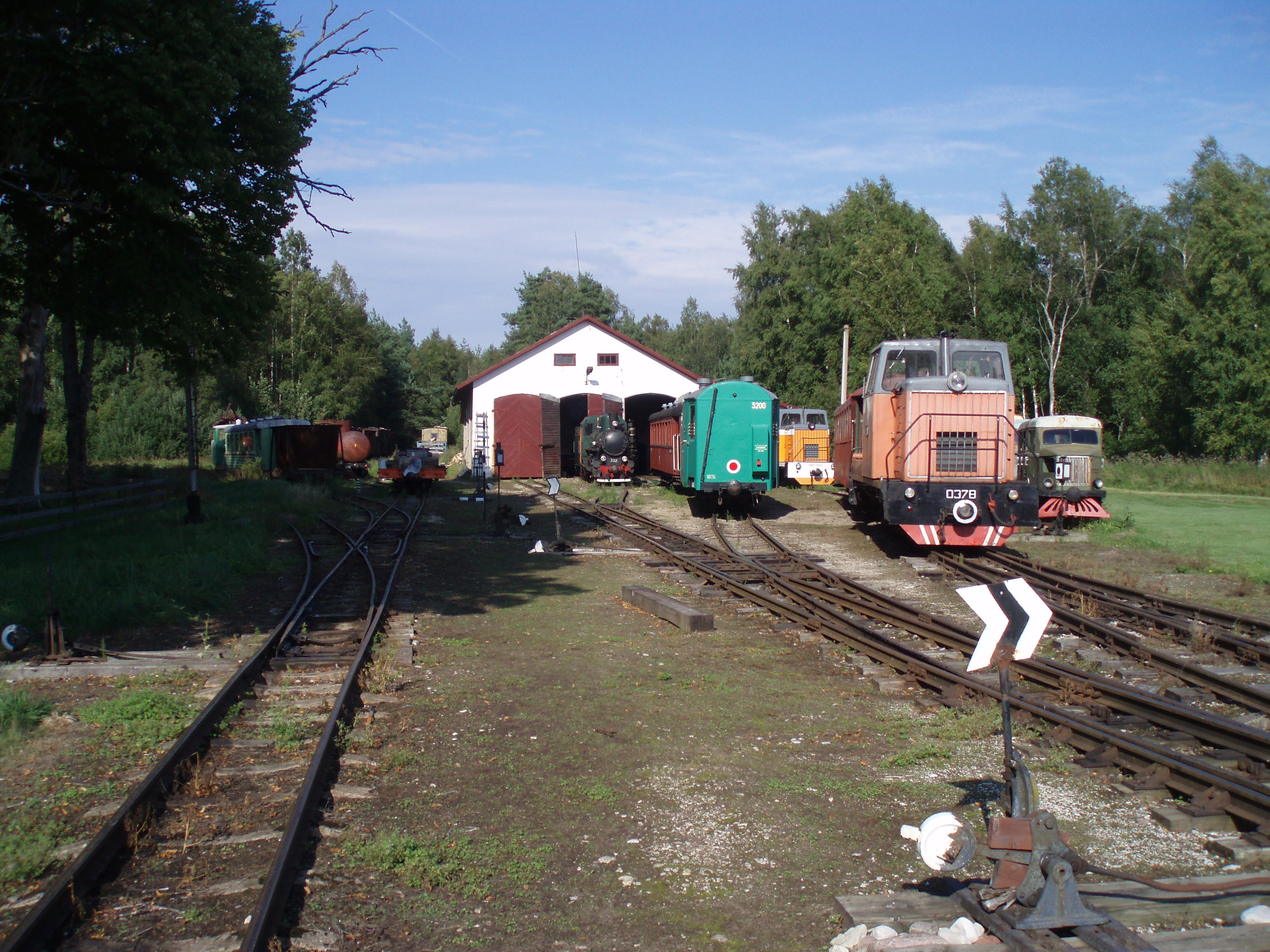 Depoo